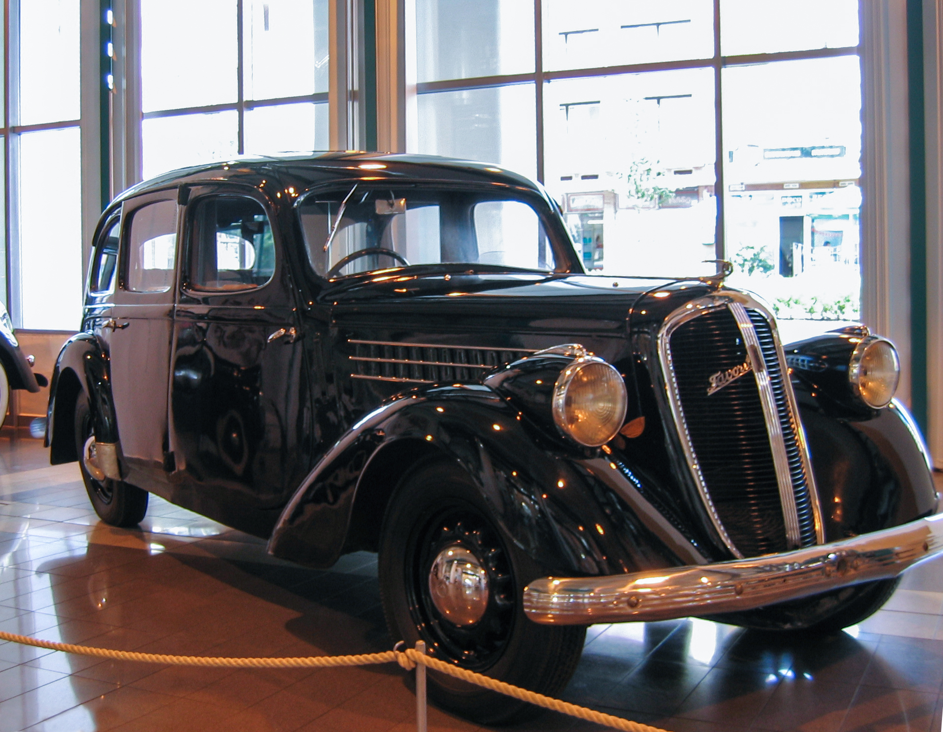 1939 Škoda Favorit (type 904) Škoda Auto Museum, Mlada Boleslav